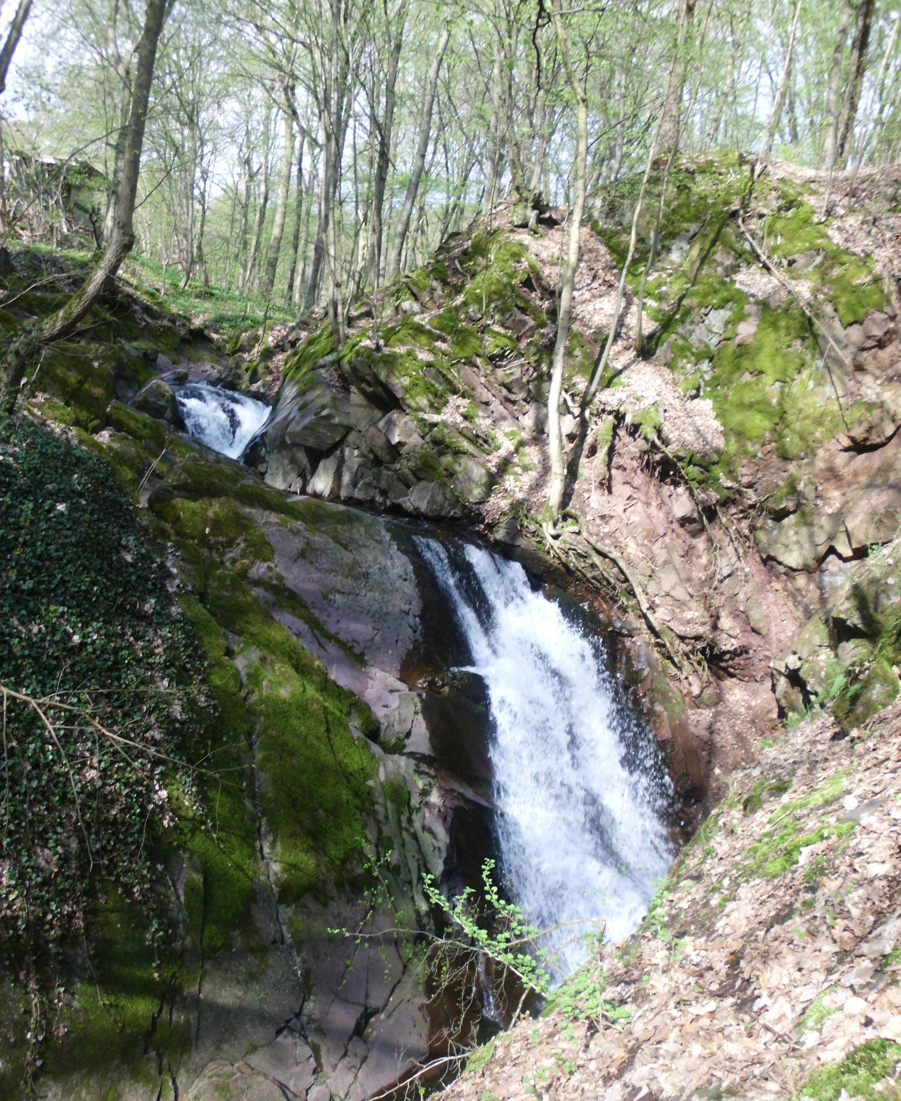 Lonauer Wasserfall bei Herzberg am Harz